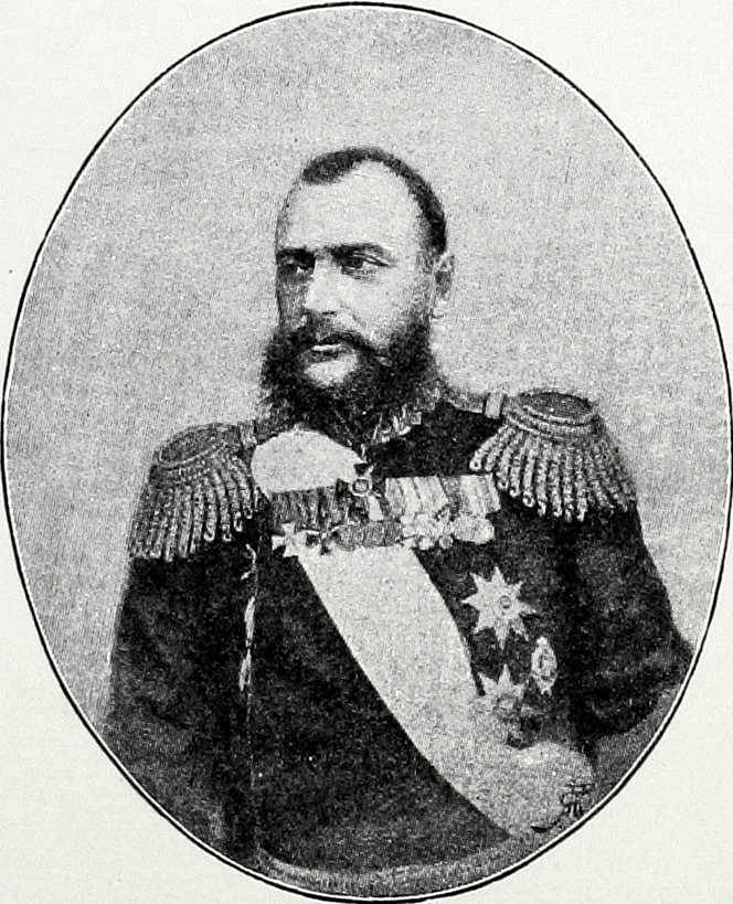 Это изображение было использовано для иллюстрирования статьи «Евгений Максимилианович» опубликованной в девятом томе «Военной энциклопедии», который был издан книгоиздательским товариществом И. Д. Сытина в 1912 году в столице Российской империи городе Санкт-Петербурге.